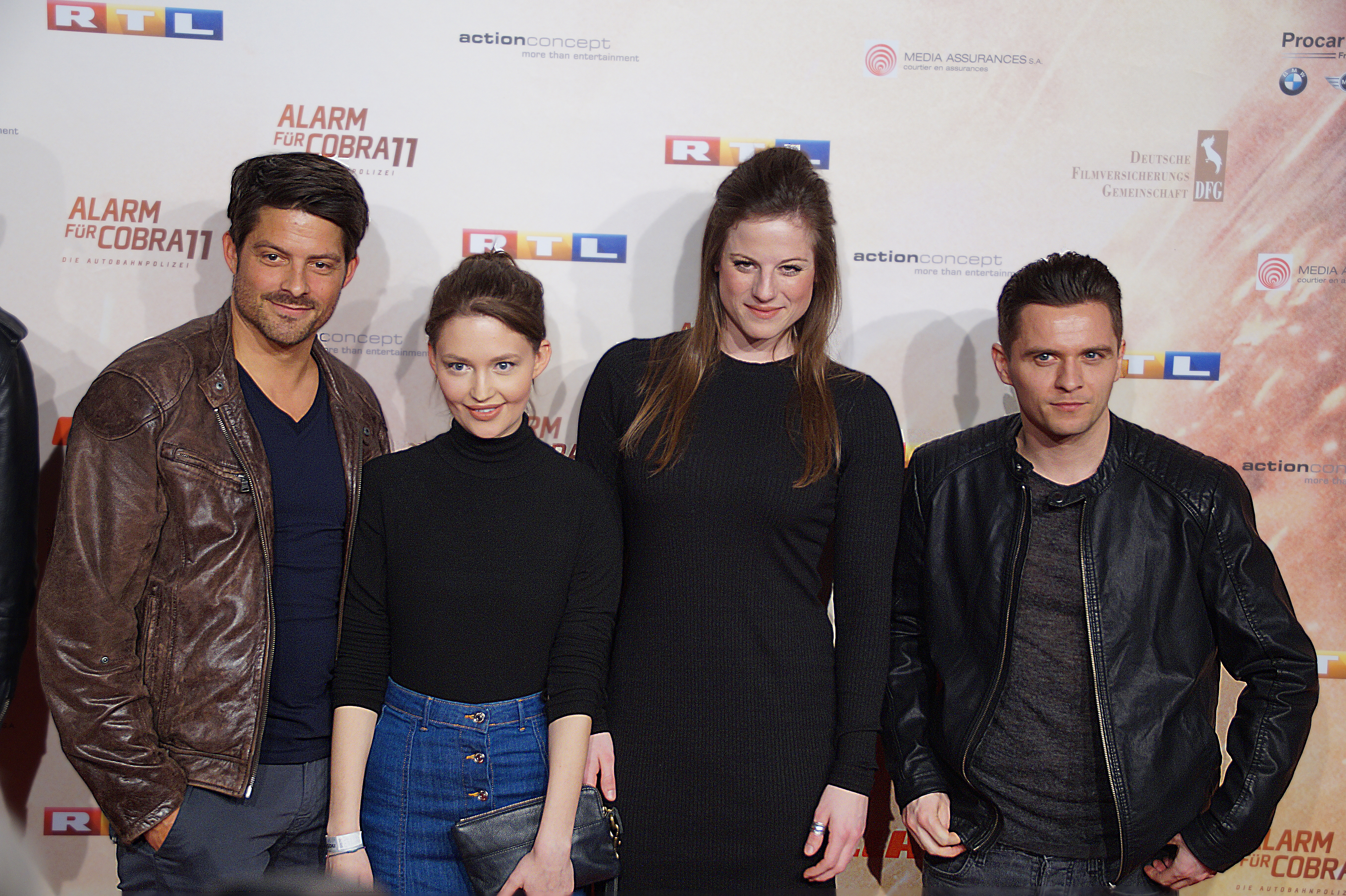 Daniel Buder, Amrei Haardt, Nora Koppen und Bejo Dohmen bei der Premiere von der 300. Folge 'Alarm für Cobra 11', April 2016.